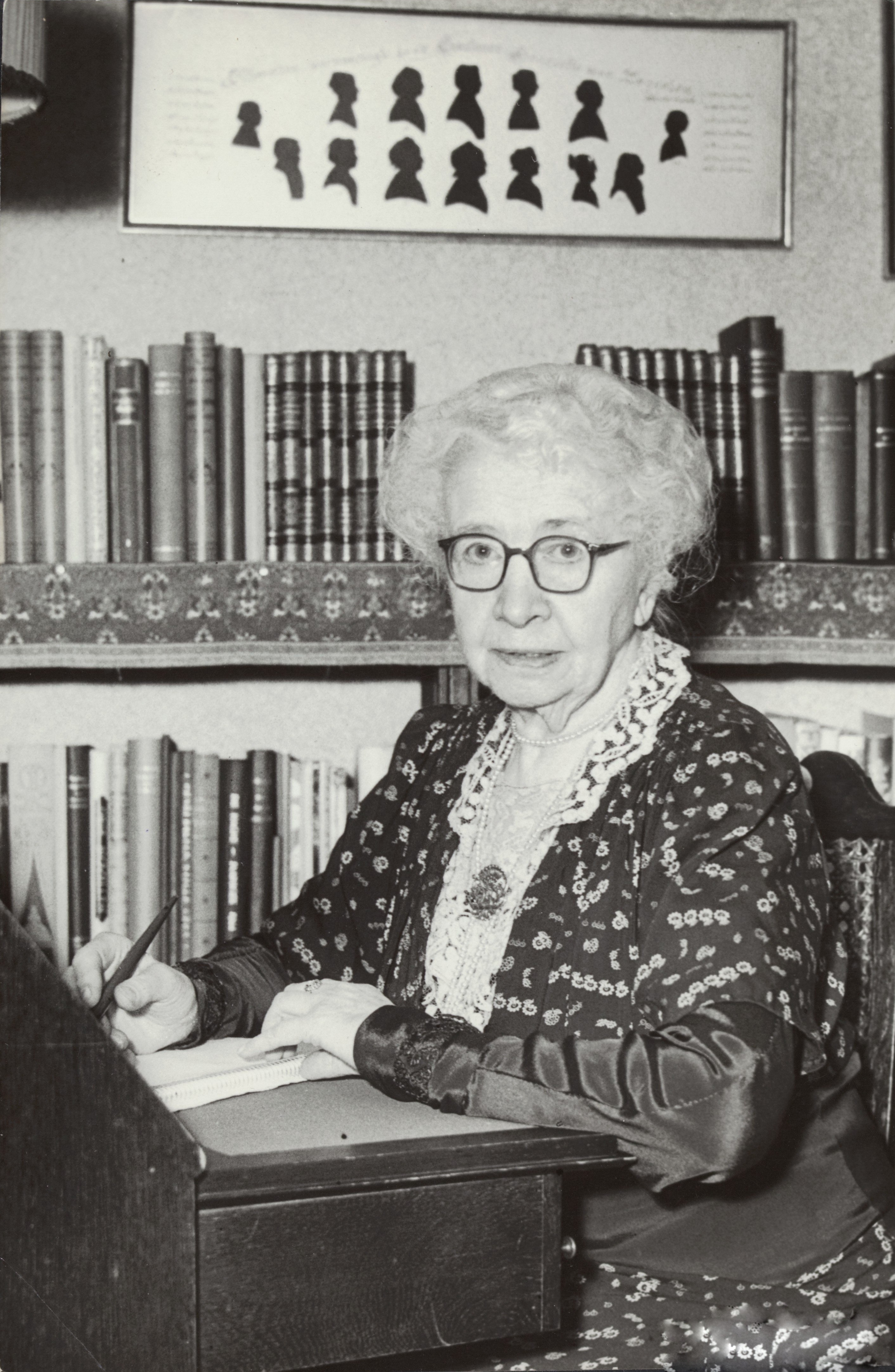 Collectie / Archief : Fotocollectie Rijksvoorlichtingsdienst Eigen Reportage / Serie : [ onbekend ] Beschrijving : Marie Christina van Zeggelen (1870-1957) Nederlands schrijfster Datum : 30 maart 1977 Trefwoorden : letterkundigen, portretten, schrijvers Persoonsnaam : Zeggelen, Marie van Fotograaf : Fotograaf Onbekend / Anefo Auteursrechthebbende : Nationaal Archief Materiaalsoort : Foto (zwart/wit) Nummer archiefinventaris : bekijk toegang 2.24.10.02 Bestanddeelnummer : 119-0415